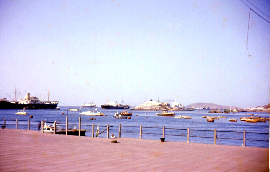 Aden 1960Aden 1960 6